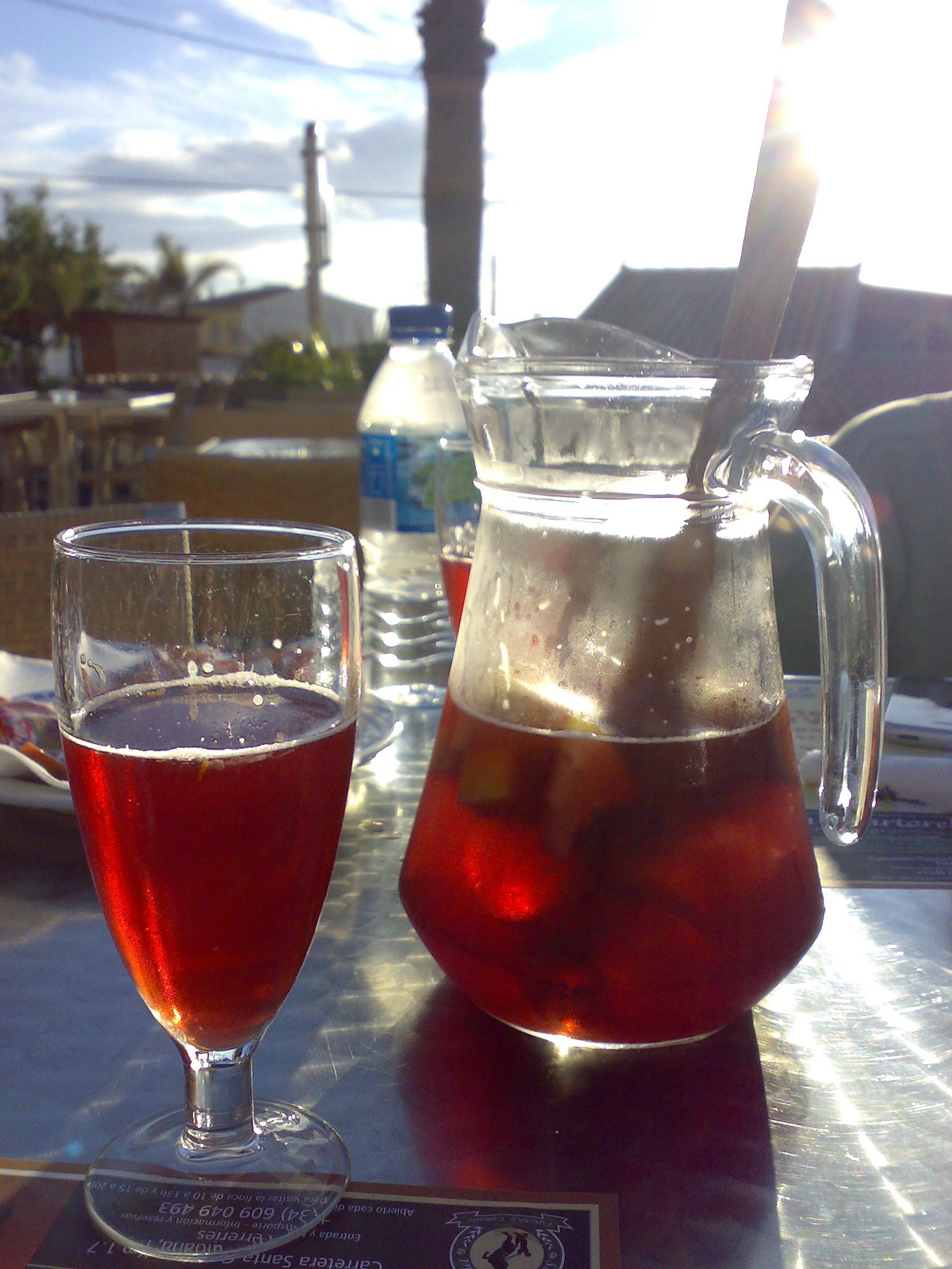 menorca calaenporter